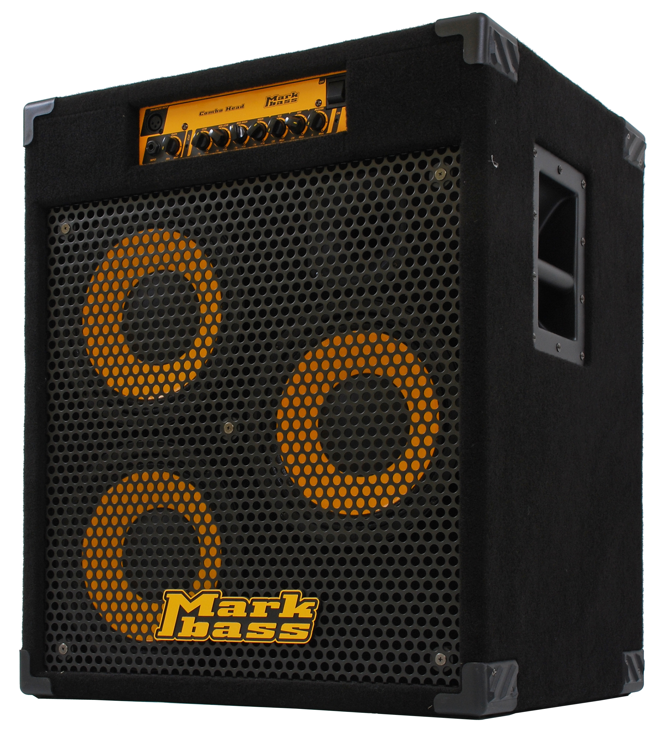 Wzmacniacz do gitary basowej CMD-103H firmy Markbass